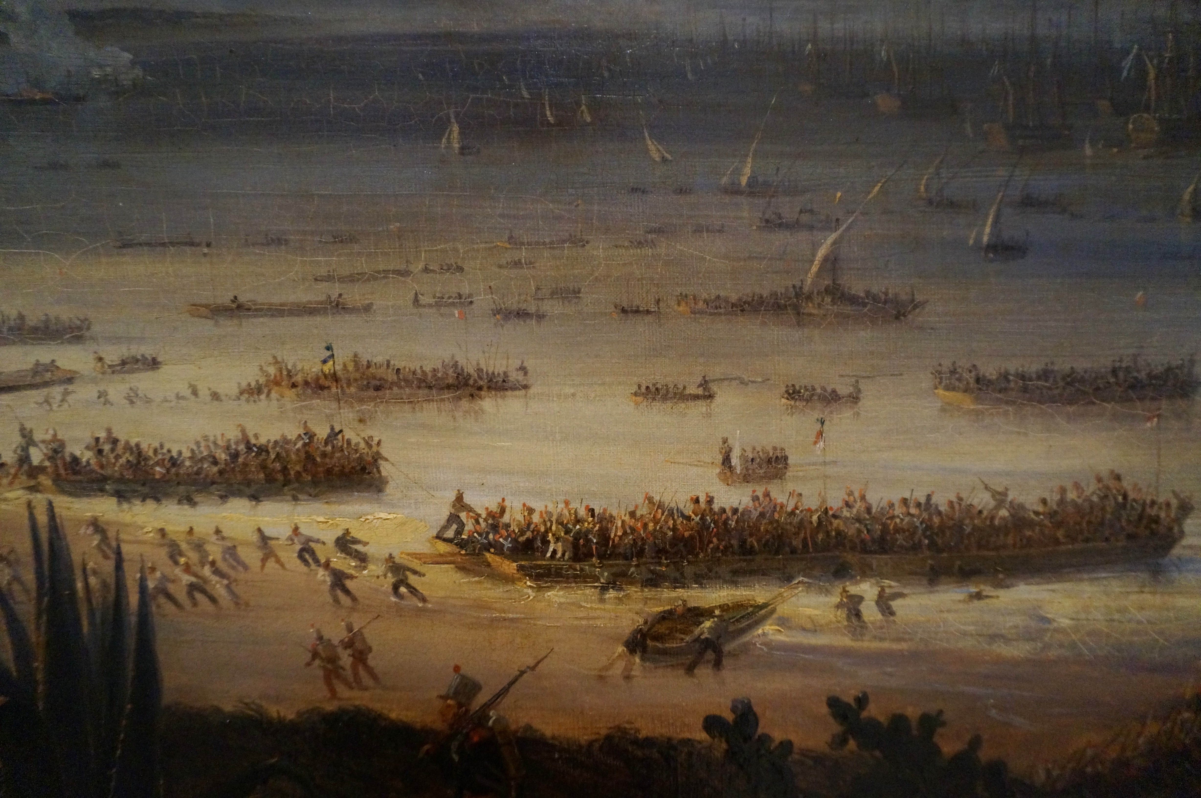 le débarquement à Sidi-Feruch